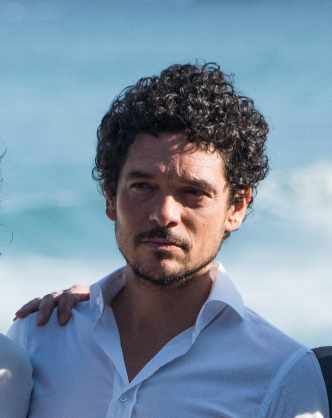 El actor Pablo Molinero en el festival de cine de San Sebastián de 2017.